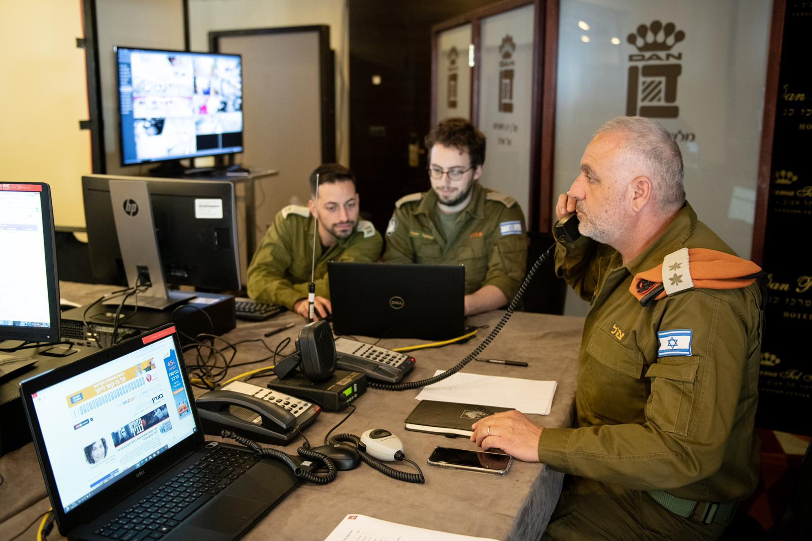 הפיכת מלון דן פנורמה תל אביב למלונית ייעודית המלונית הראשונה שמיועדת לקליטת חולי קורונה במצב קל, בהנחיית שר הביטחון, פיקוד העורף ומשרד הביטחון.